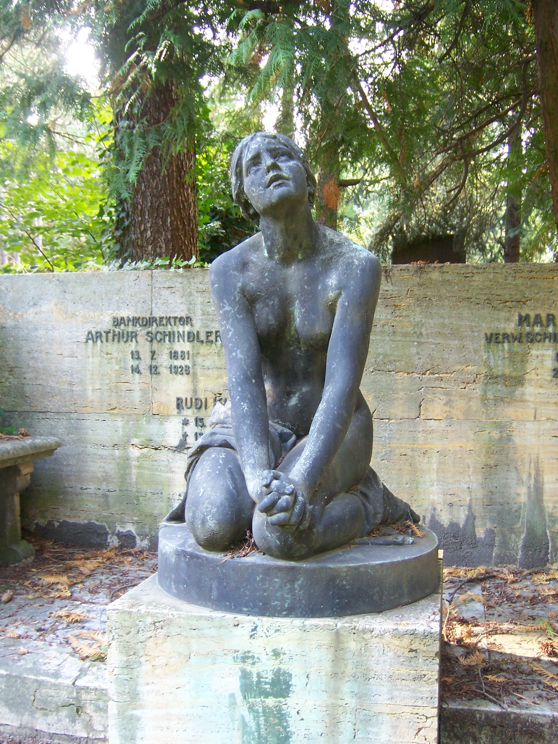 Fabricius: Richard Daniel Fabricius (1863–1923): „Trauernde“. Grabstätte Schindler, Südfriedhof Leipzig